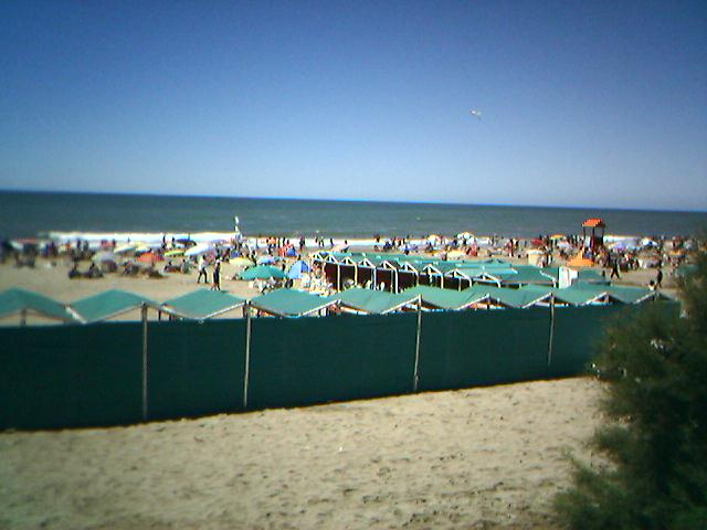 Una de las numerosas playas de Villa Gesell, Argentina. Yo saqué la foto, libero todos los derechos y la pongo en dominio público